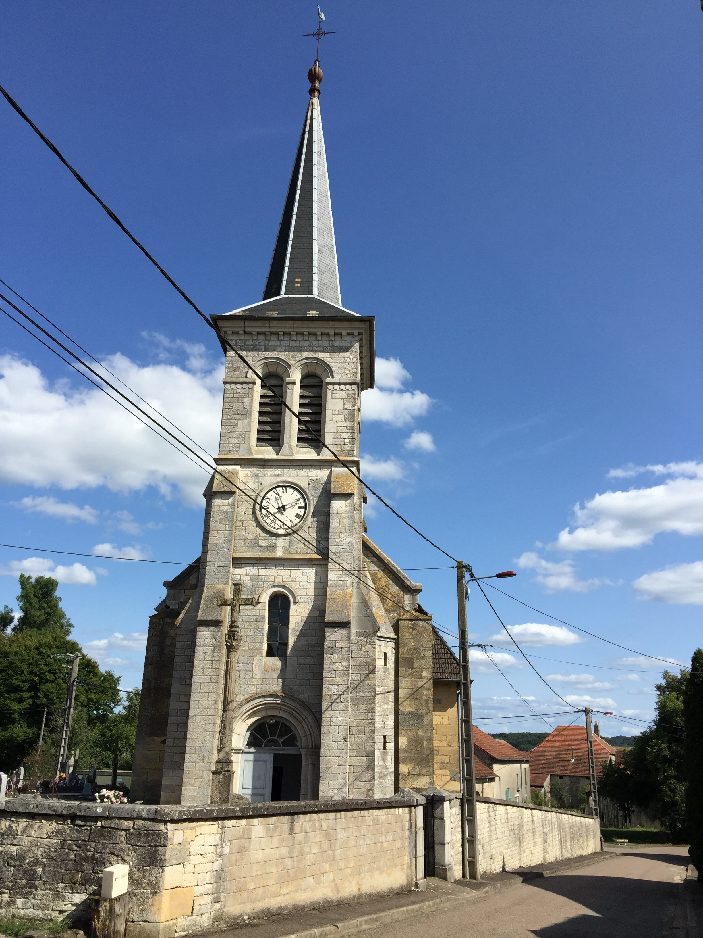 Eglise de Oigney